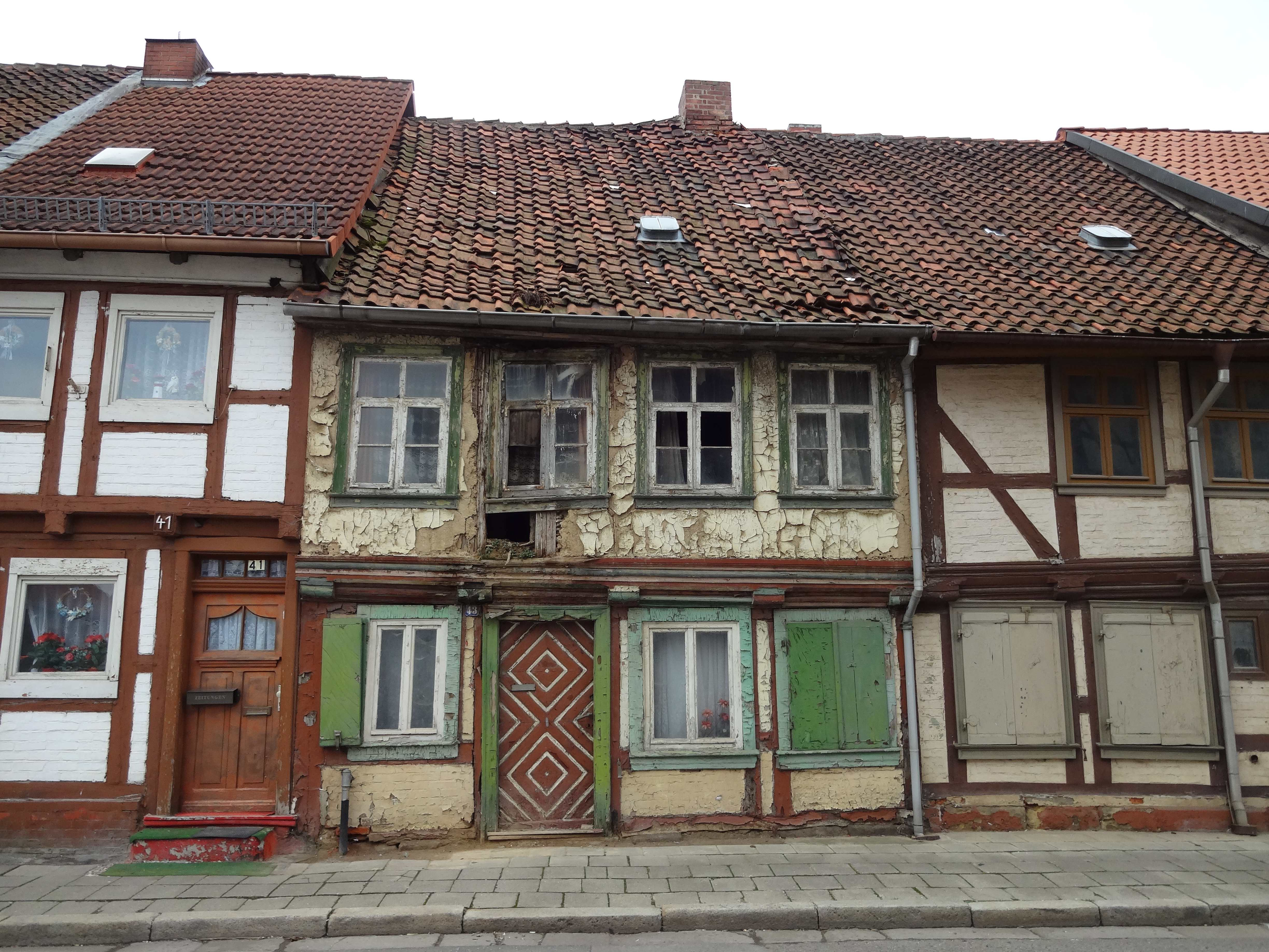 denkmalgeschütztes Fachwerkhaus in der Kornstraße 43 in Derenburg, Ortsteil von Blankenburg (Harz)